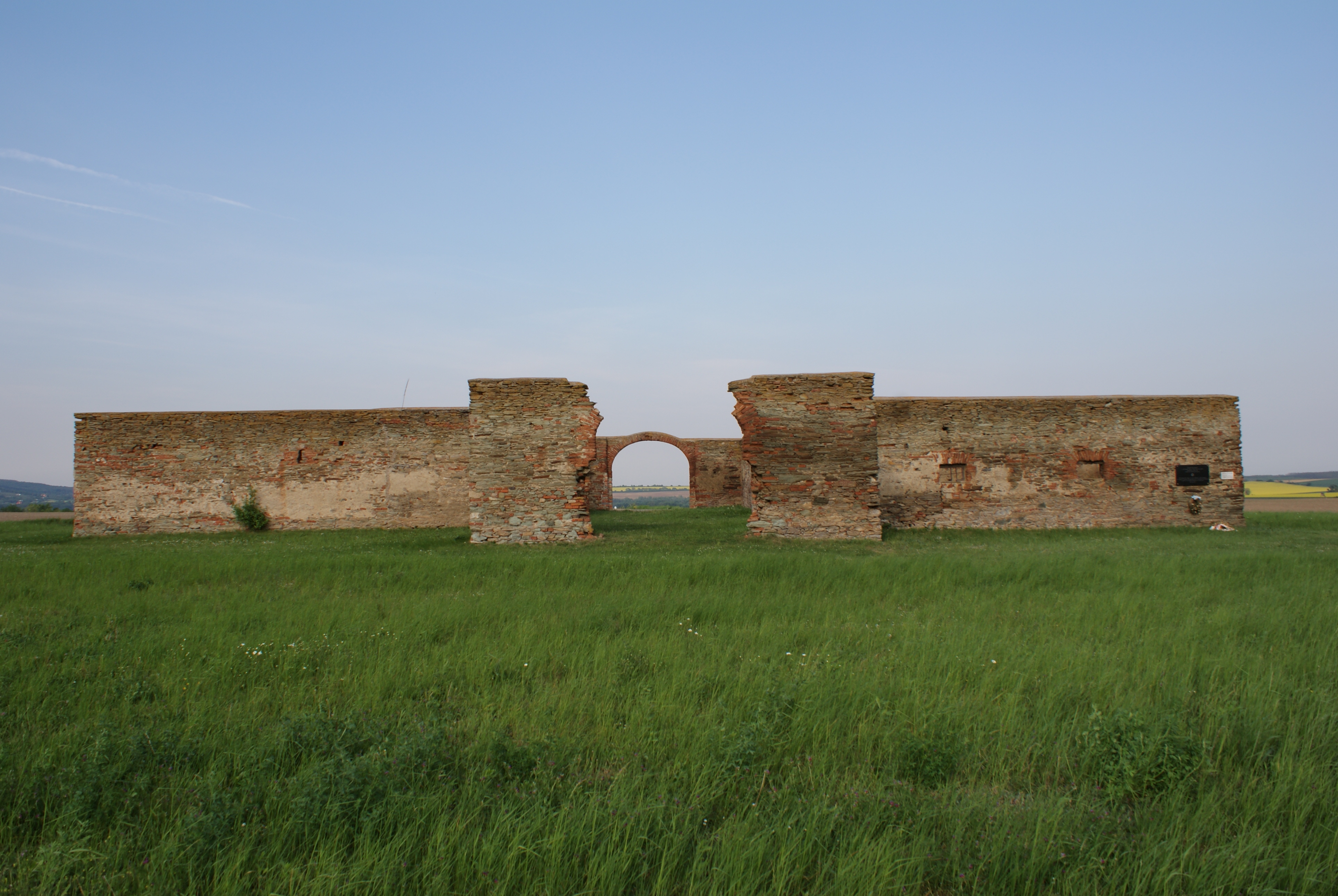 Kreuzstadl Westseite, Rechnitz